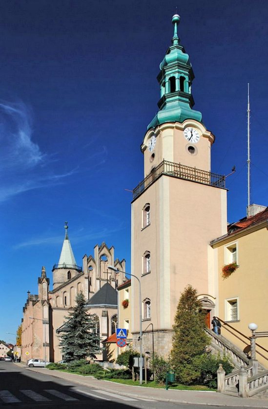 Świerzawa, ratusz, 1810, pocz. XX